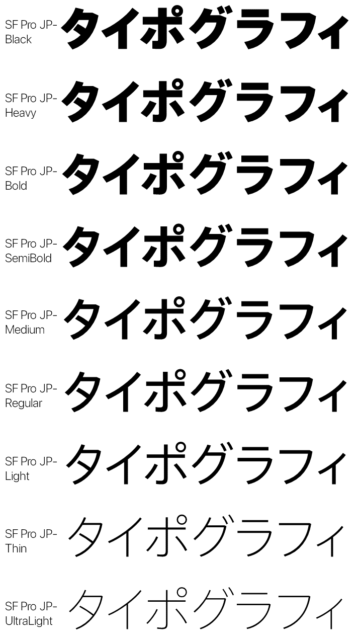 ウェイトは全8種類